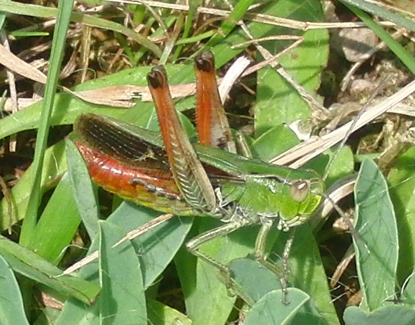 Stenobothrus lineatus, m., stridulating, Heidegrashüpfer, Balderschwang, Bayern, Germany